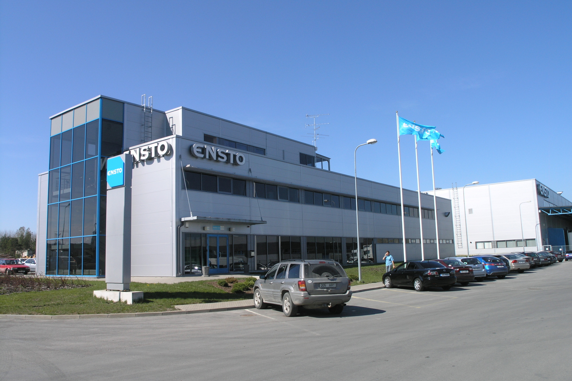 Ensto tootmishoone Keilas.